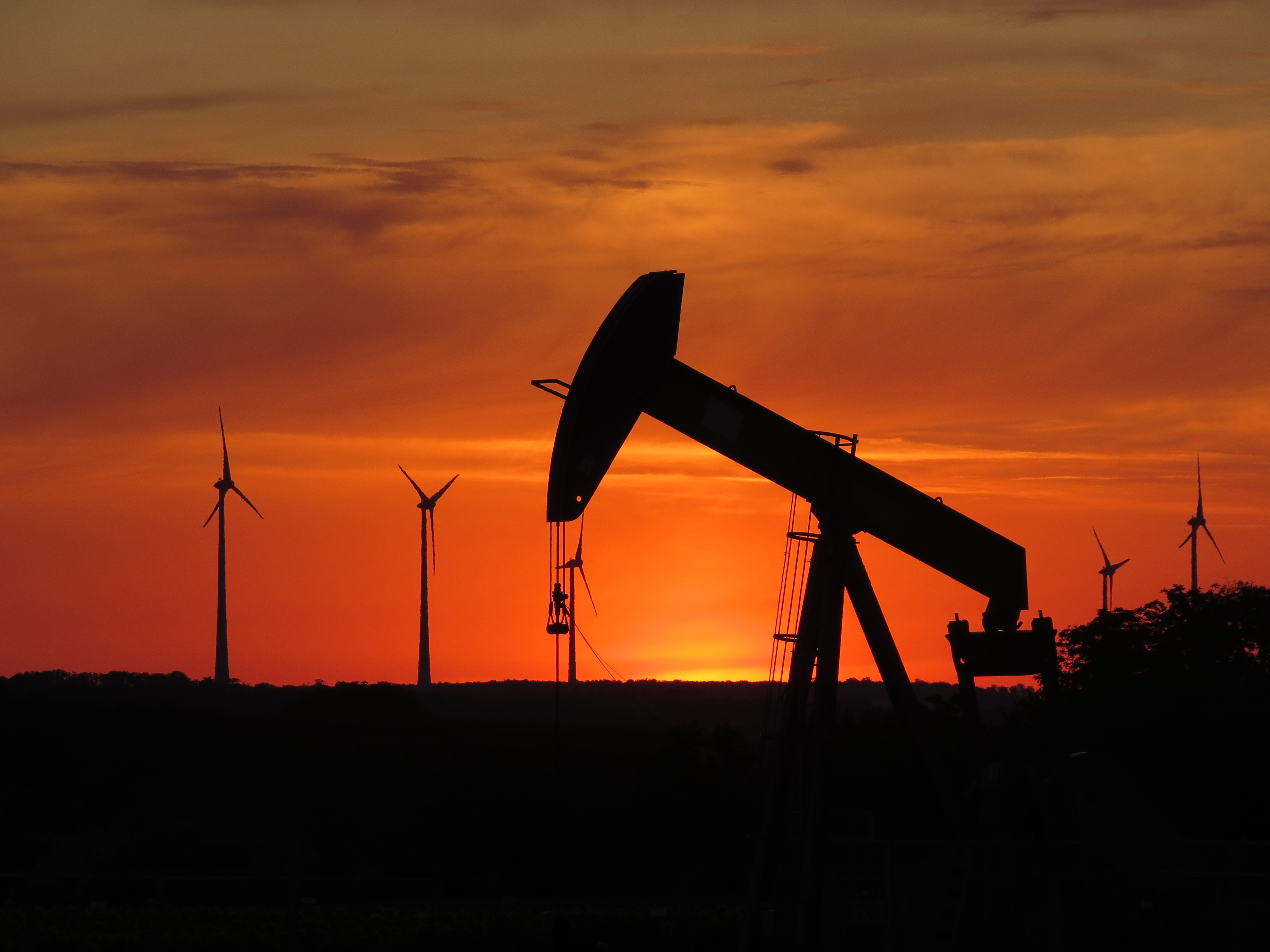 Sonnenaufgang im Weinviertel, Pumpenbock vor Windrädern